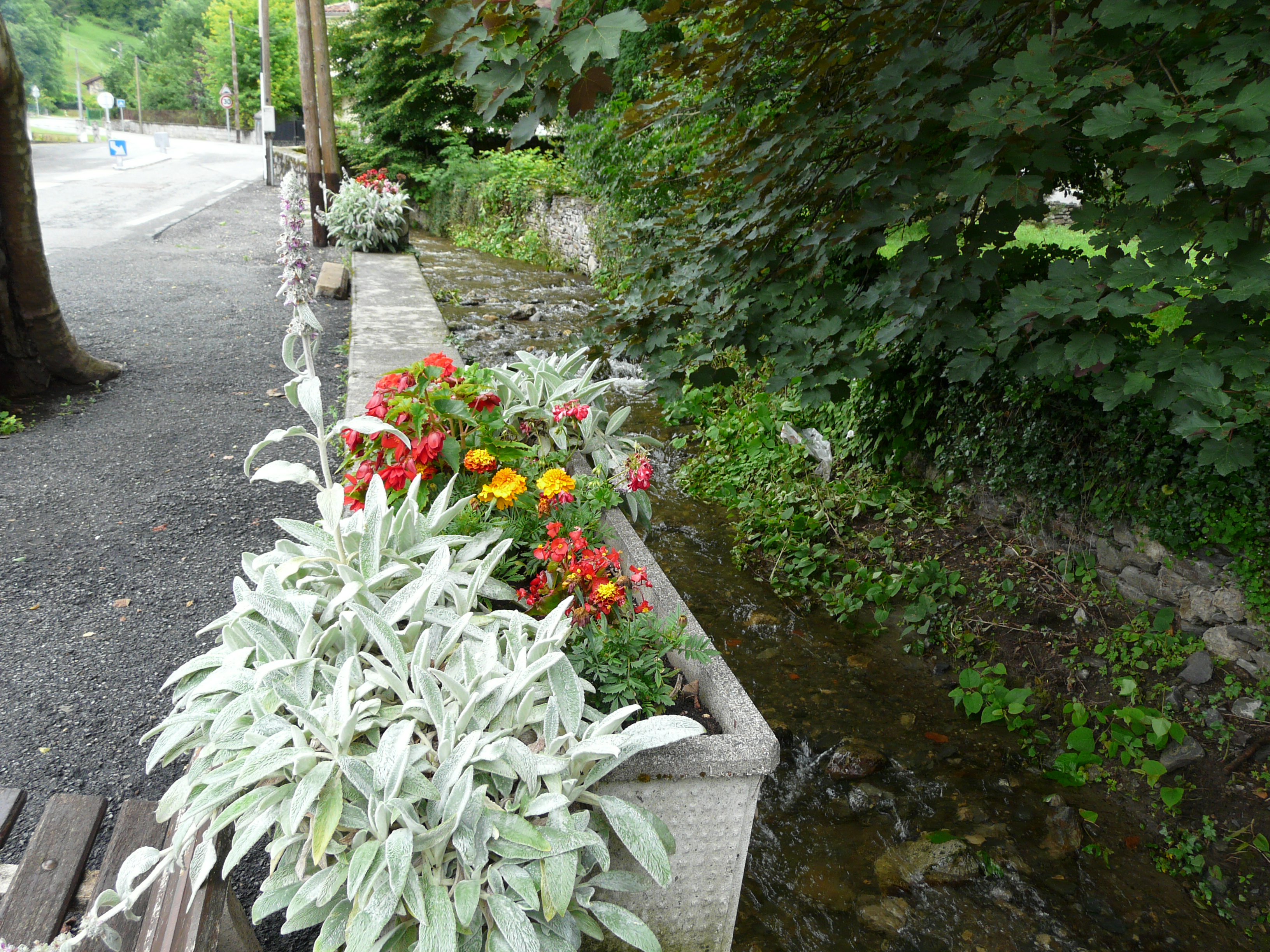 Le ruisseau de Gouhouron dans le village de Siradan, Hautes-Pyrénées, France.